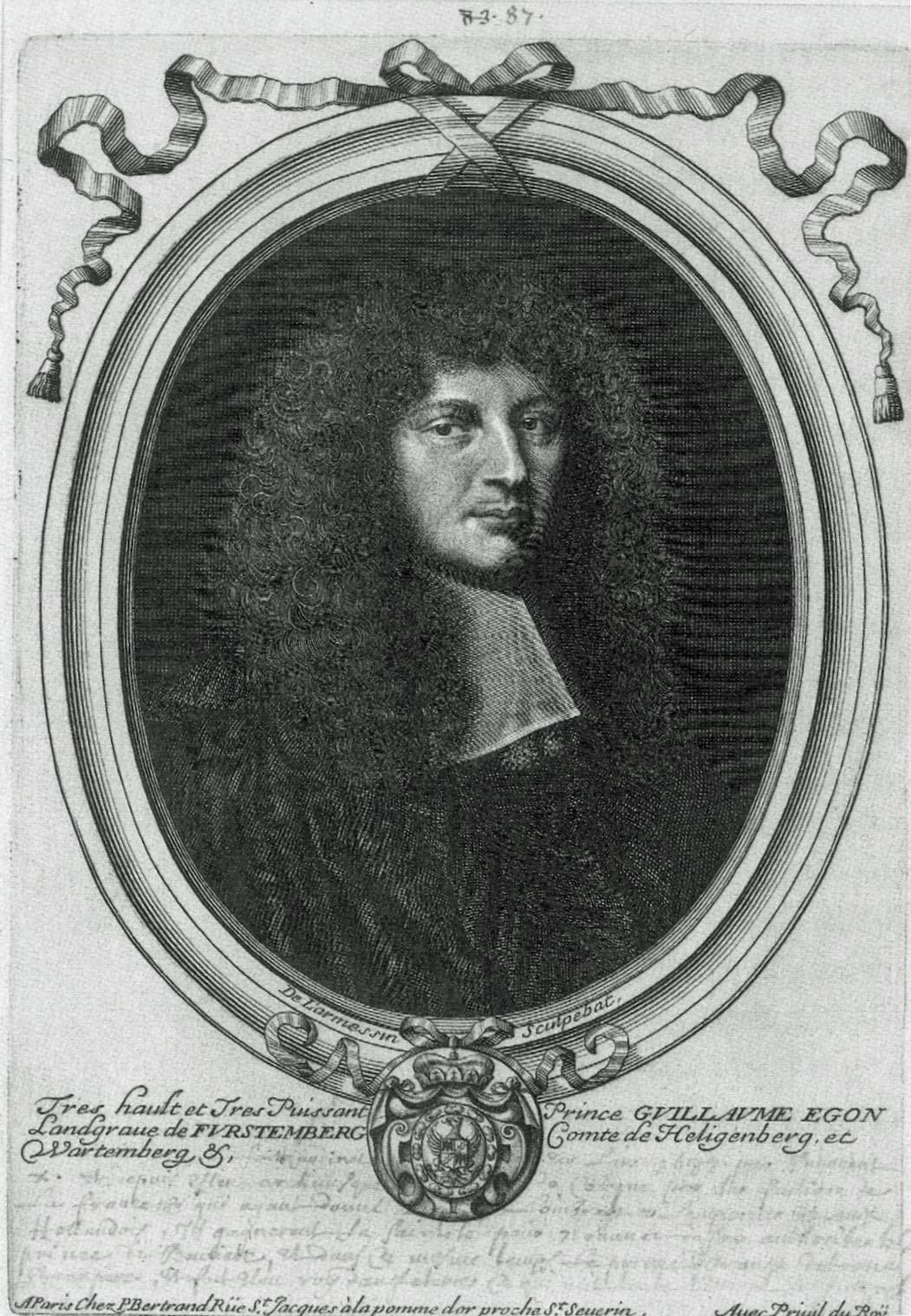 Wilhelm Egon von Fürstenberg (1629 – 1704) Landgraf Seit 1664 Fürst Seit 1682 Bischof von Straßburg Kupferstich